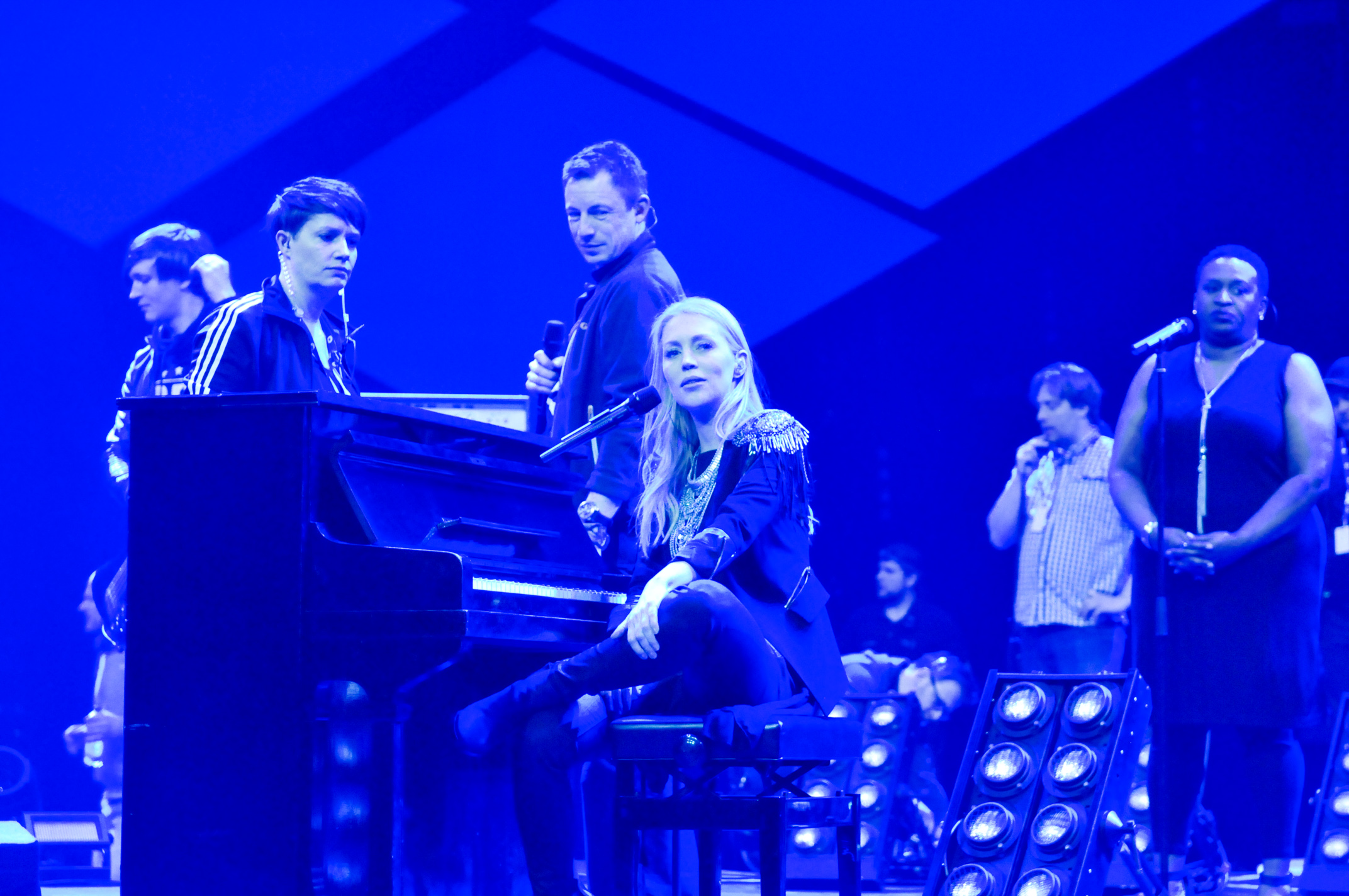 Alexa Feser, Unser Song für Österreich 2015, Probe und Pressekonferenz in Hannover